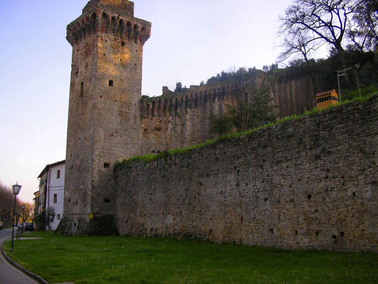 Torre del Brunelleschi, Vicopisano, Tuscany, Italia